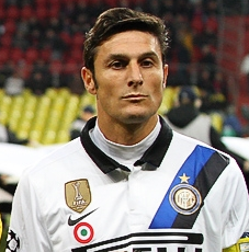 Javier Zanetti subito prima di CSKA Mosca-Inter 2-3